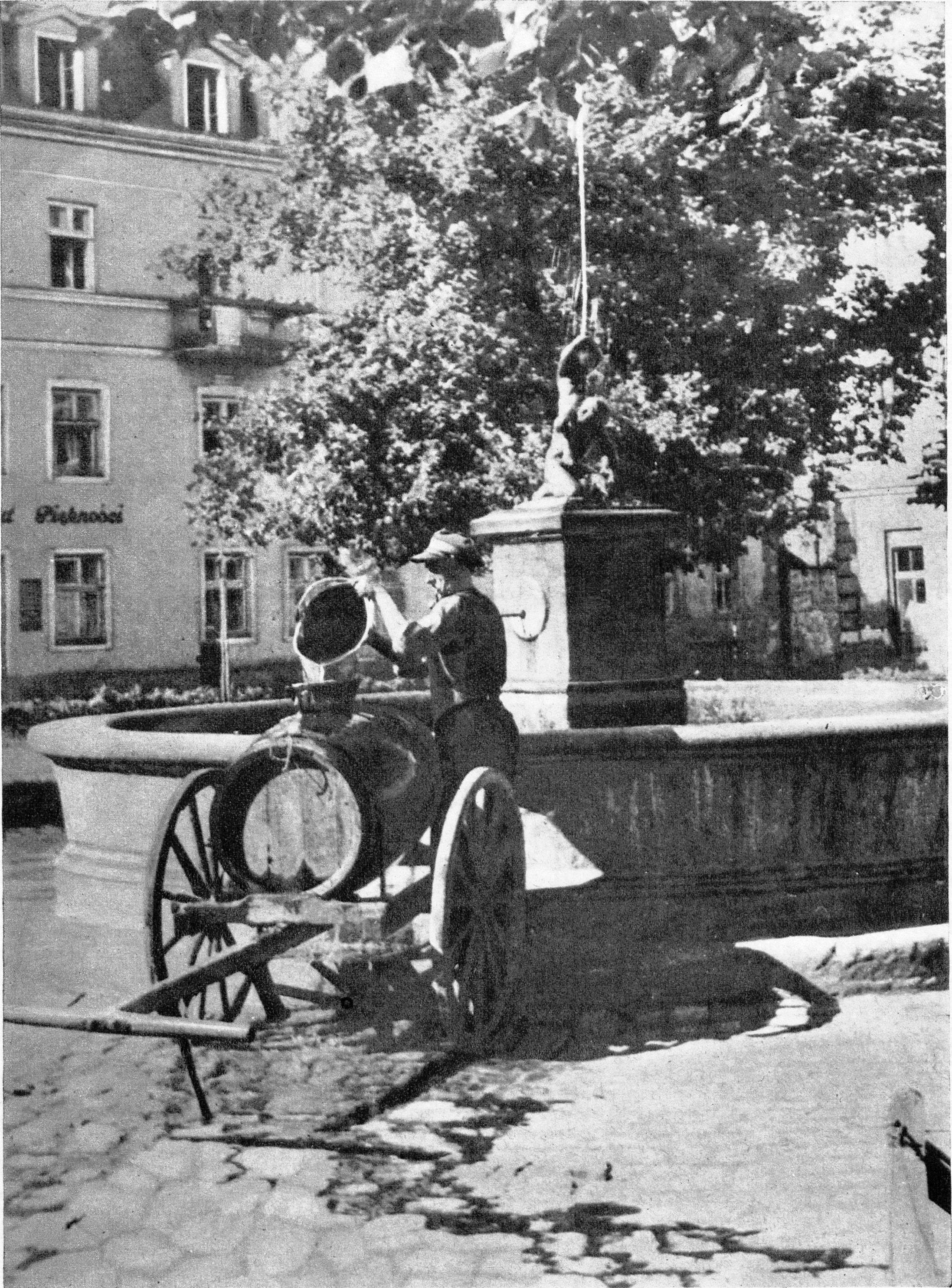 Площа Домбровського (тепер Маланюка) у Львові.